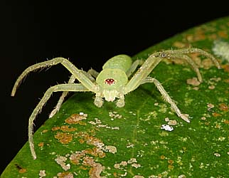 young Oxytate hoshizuna from Okinawa.